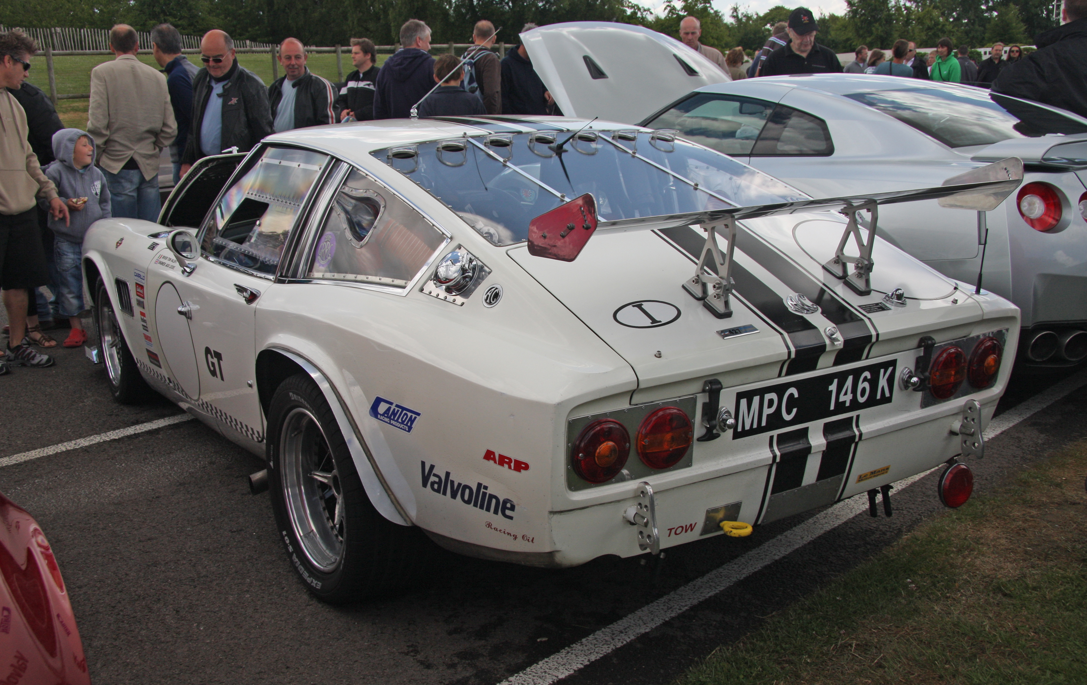 AC Frua